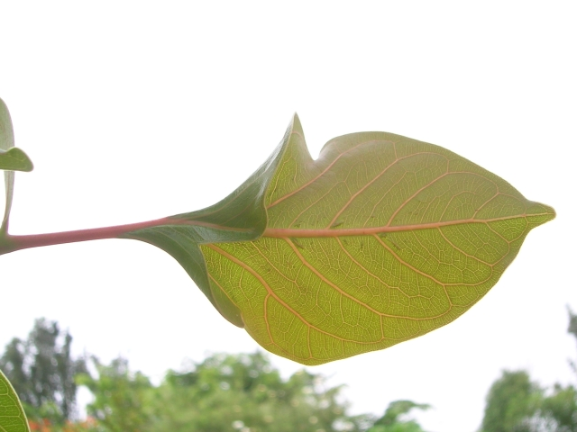 Ficus benghalensis var. krishnae leaf at Hebbal, Bangalore, India